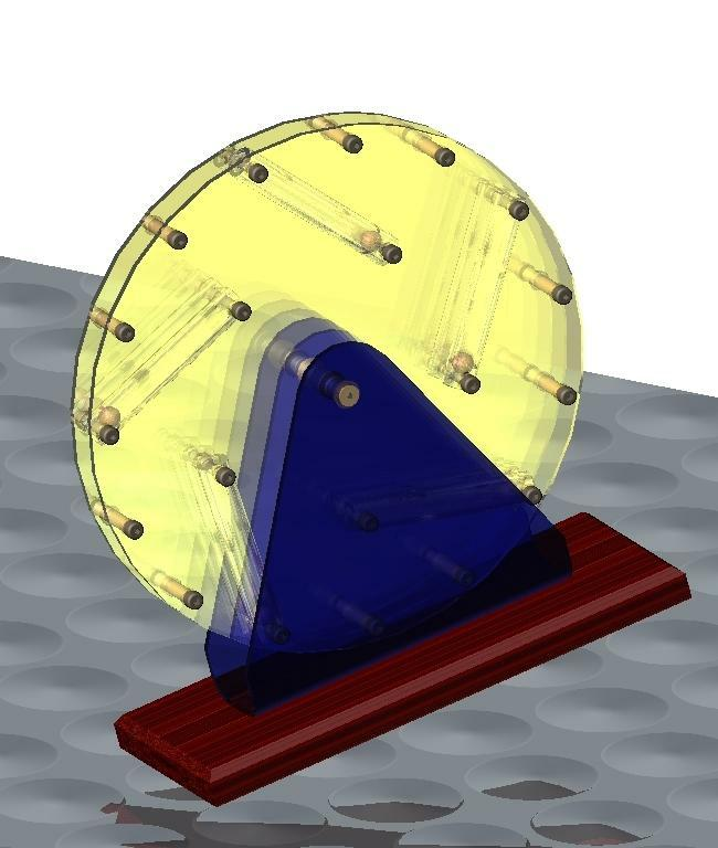 image de synthèse réalisée sous SolidWork et son éditeur de texture intégrée. Temps de mise en oeuvre 2h (1h40 modèle 3D, 20min textures). Fonctionnement: Les 5 billes se déplacent à l'intérieur des tubes provoquant ainsi un nouveau déséquilibre qui entretient le mouvement. C'est pendant ce basculement que l'énergie est en partie perdue.